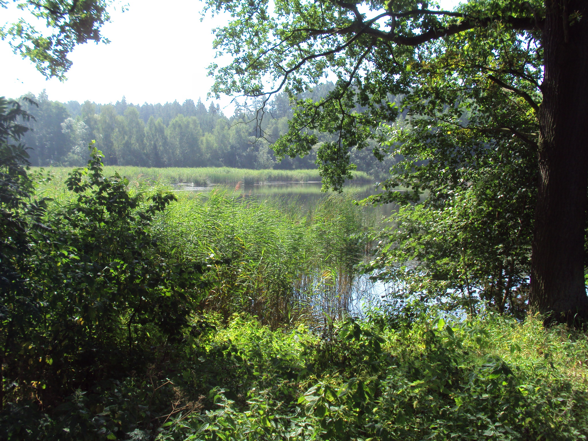 Panin rybník je mezi Dobranovem a Zákupy, mimo trasy, katastr Dobranov